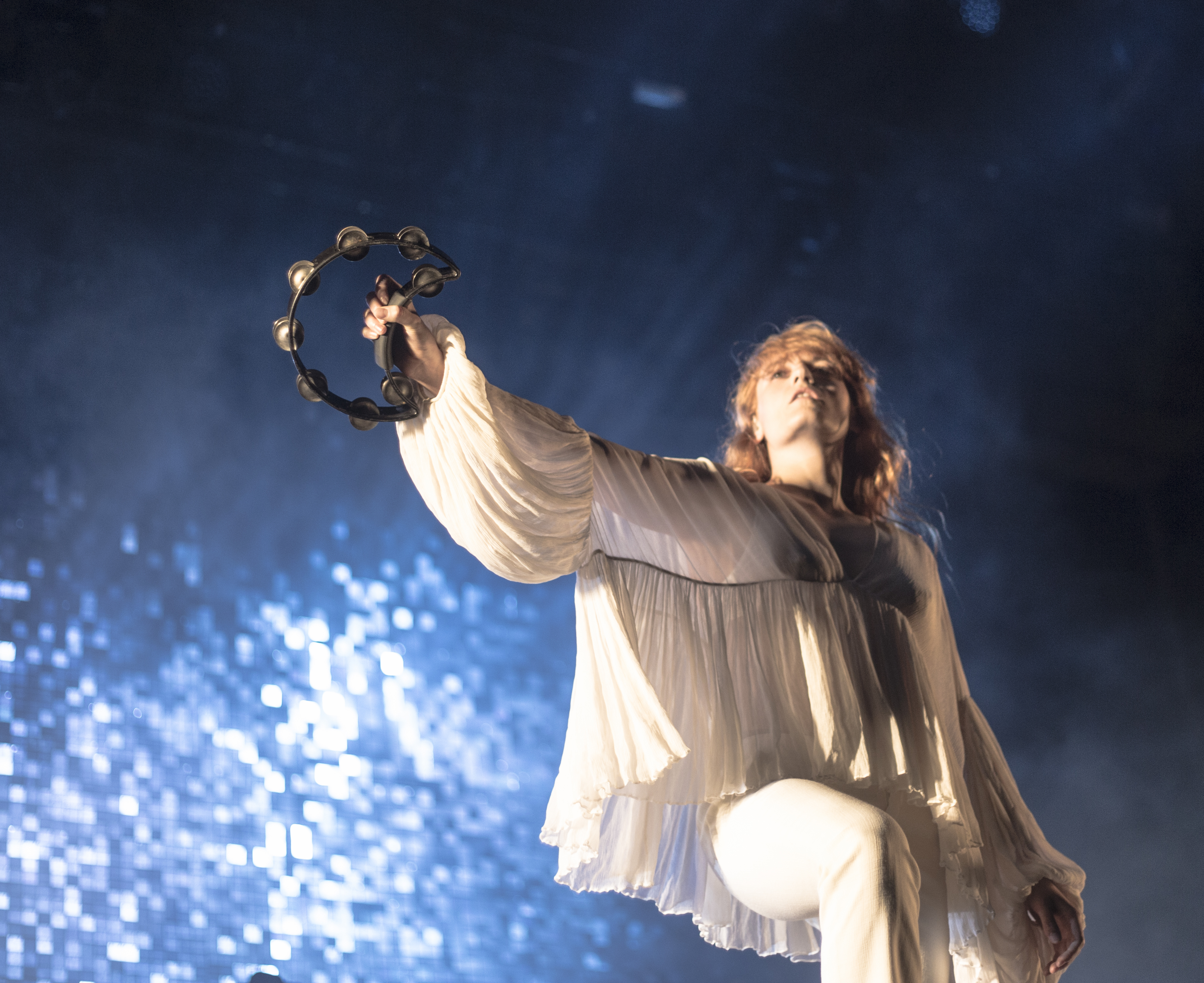 FIB 2015